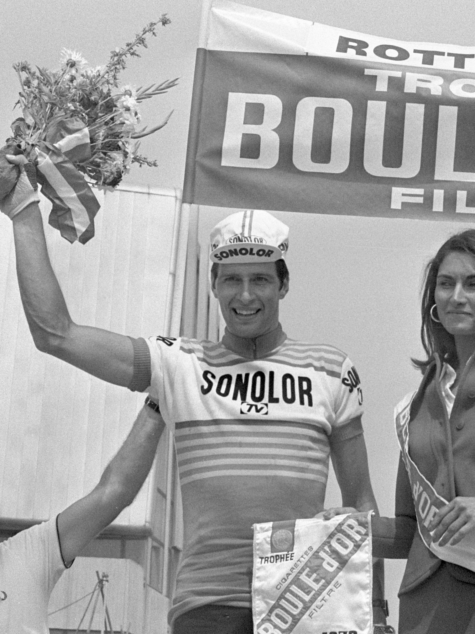 Finish eerste etappe Tour de France , Scheveningen naar Rotterdam, huldiging Teirlinck